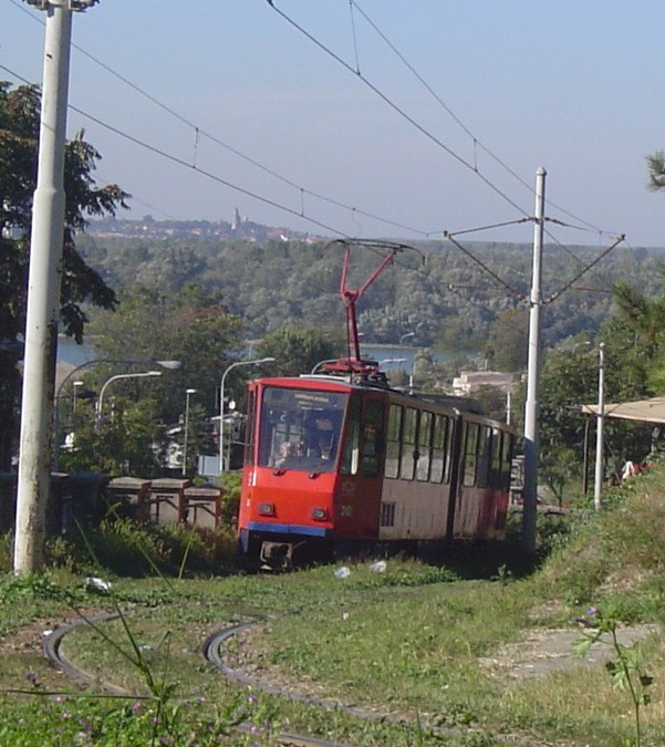 Снимио Matija, 19.10.2006. Трамвај број 2 се пење на Калемегдан. У позадини се виде ушће Саве у Дунав, Велико ратно острво и Земун. Belgrade tram number 2 is climbing up Kalemegdan. In the background, confluence of river Sava into the Danube, Veliko ratno ostrvo and Zemun are visible.